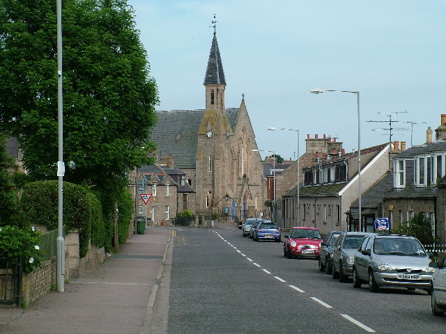 Main street and Church in Pitmedden, Aberdeenshire